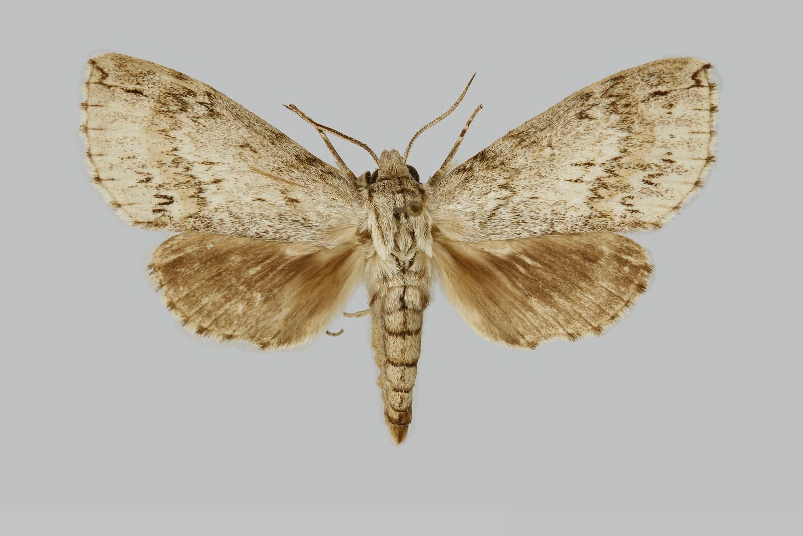 Malgassoclanis suffuscus, male, upperside. Madagascar, Ouest; Rte Morondava - Ivato 62km E. de Morondava forêt de Manamby